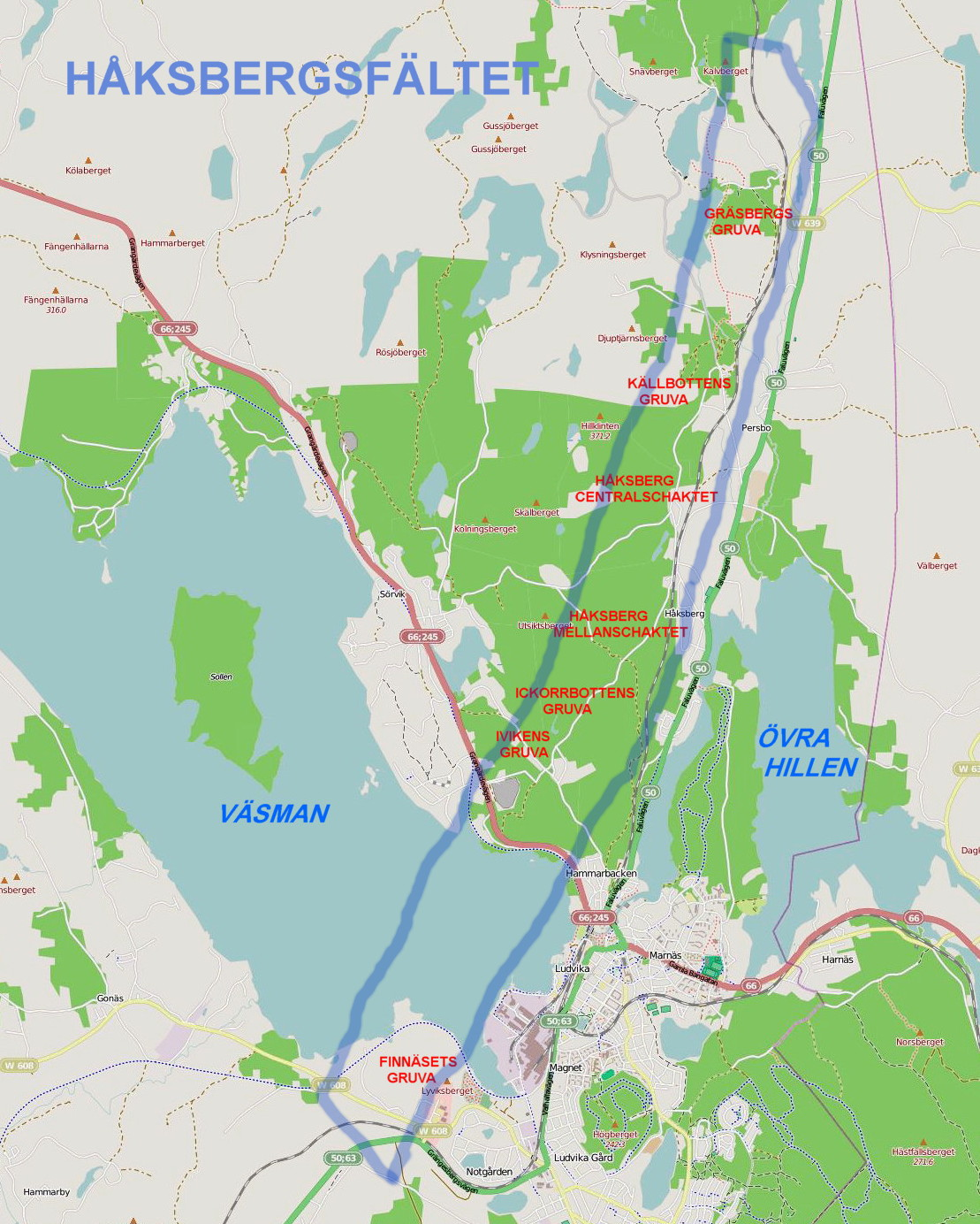 Karta över Håksbergsfältet i Ludvika kommun. Bakgrundskarta: Open Street Map Källa: Nordic Iron Ore